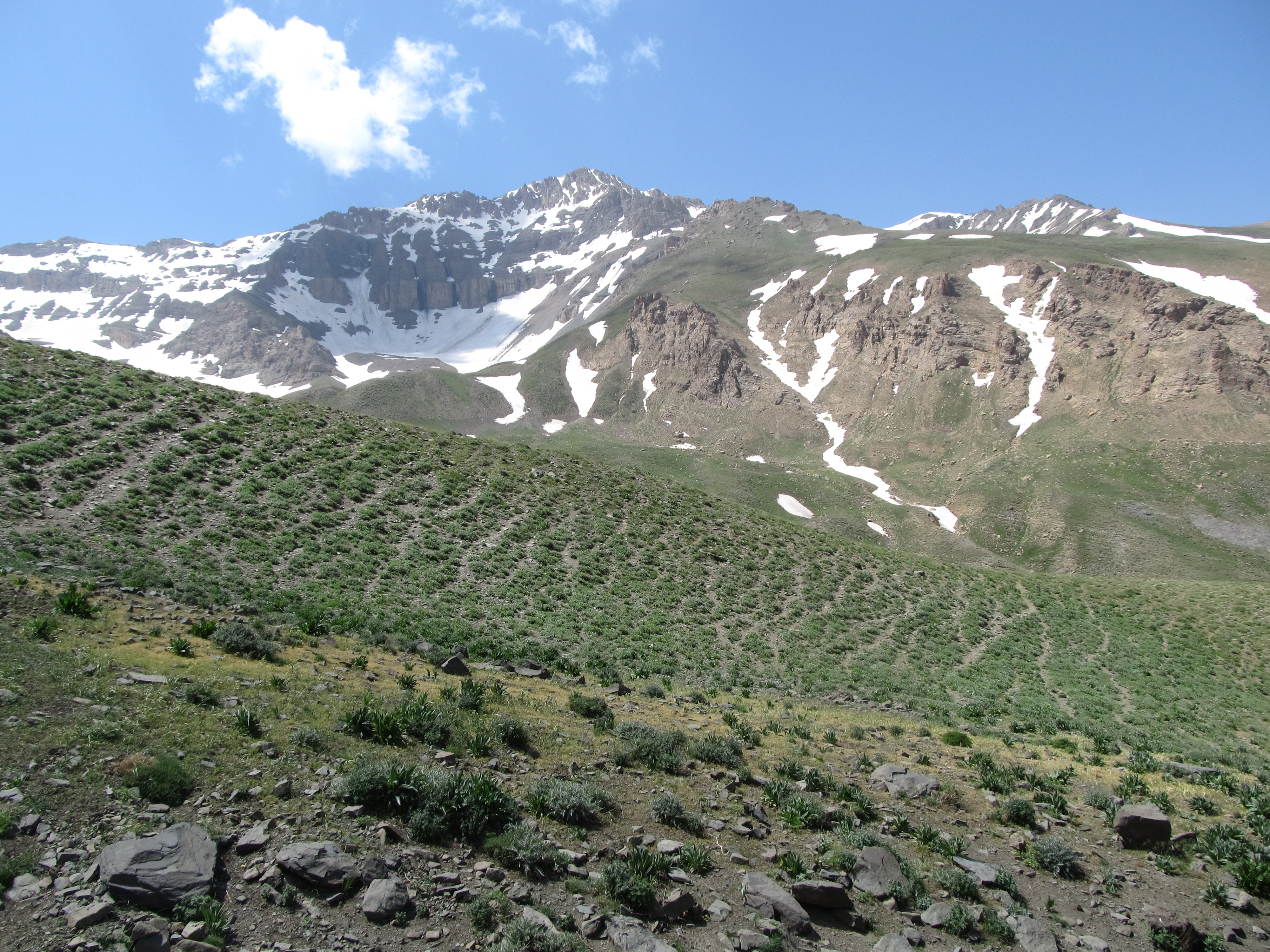 قله خشچال ، ارتفاعات الموت ، قزوین